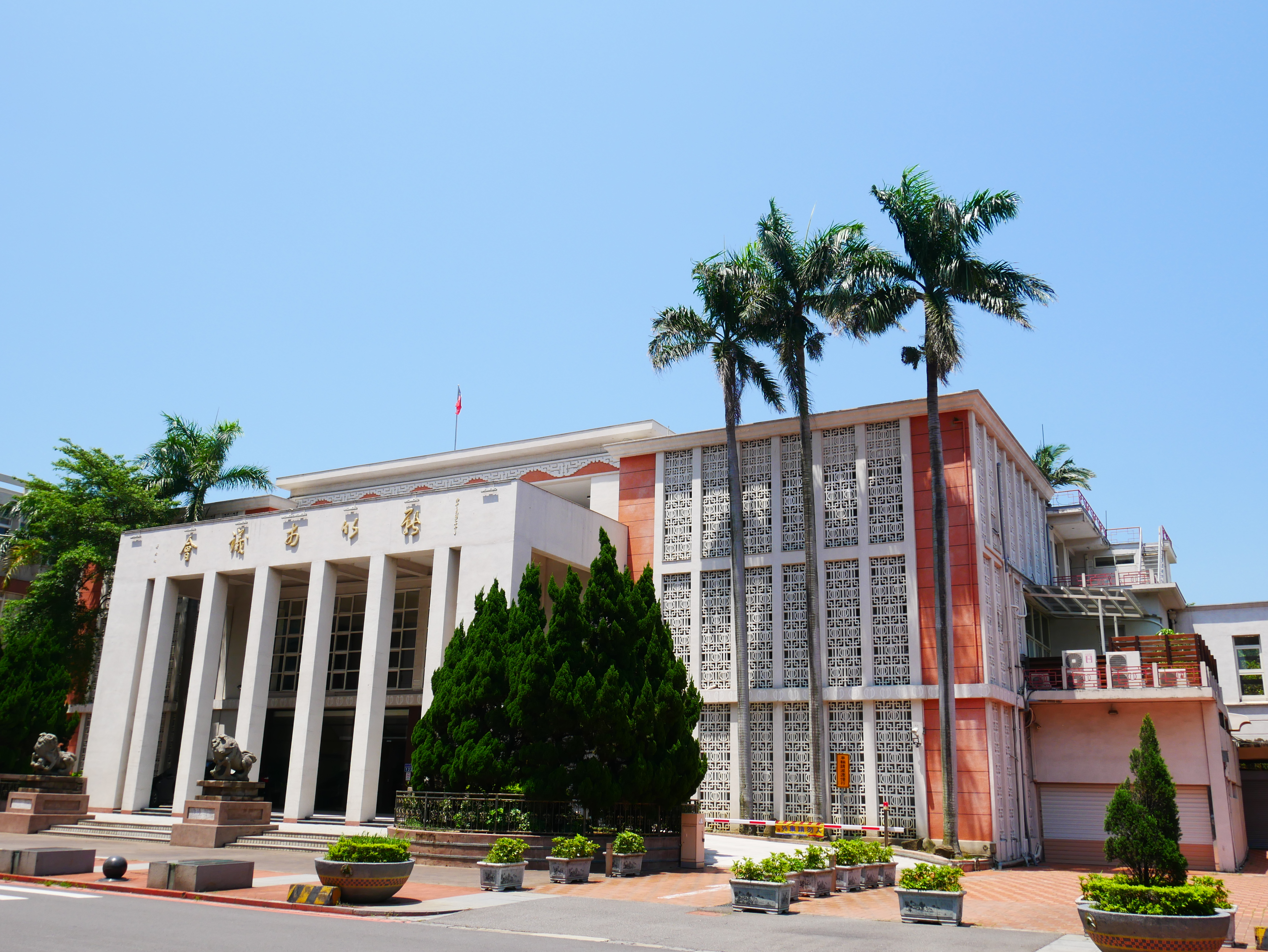 中文（台灣）: 新竹市議會大樓，新竹市北區北門聯里大同里